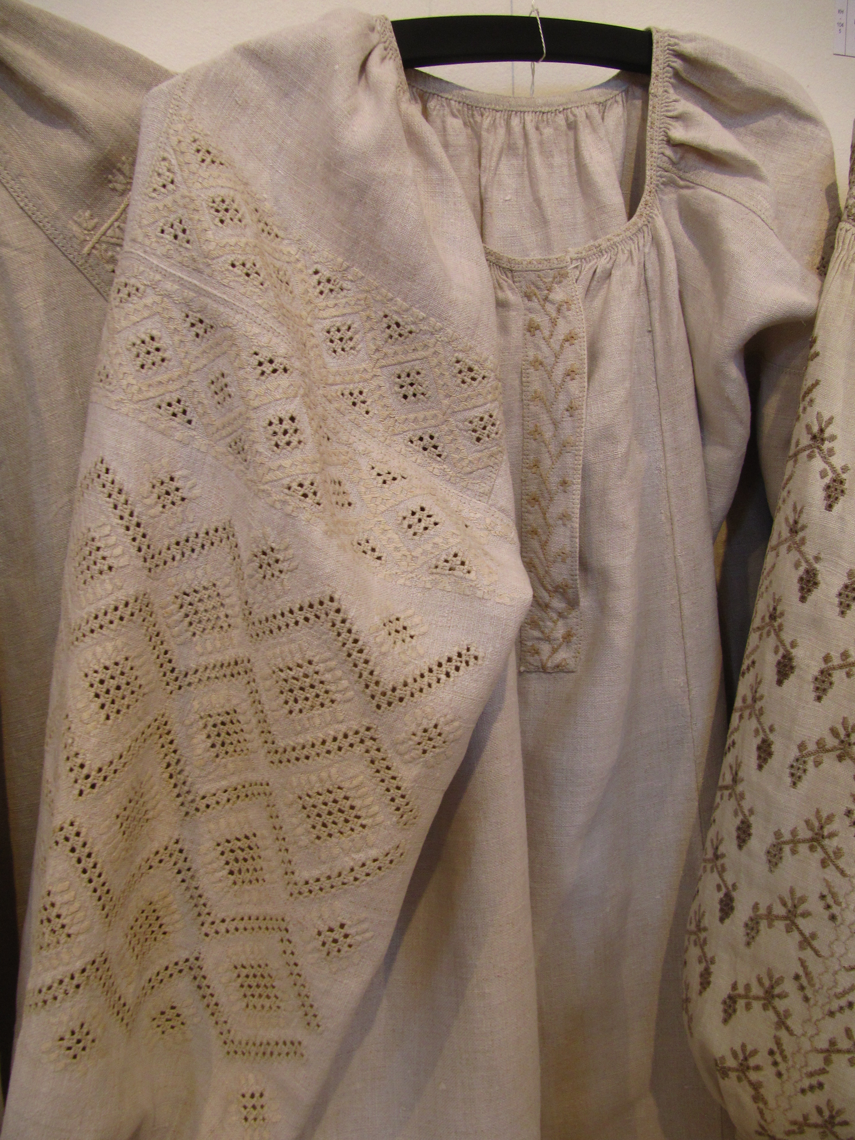 Жіноча сорочка. Кінець 19 ст. Полтавська обл. Миргородський р. Виставка в музеї Івана Гончара (Київ).